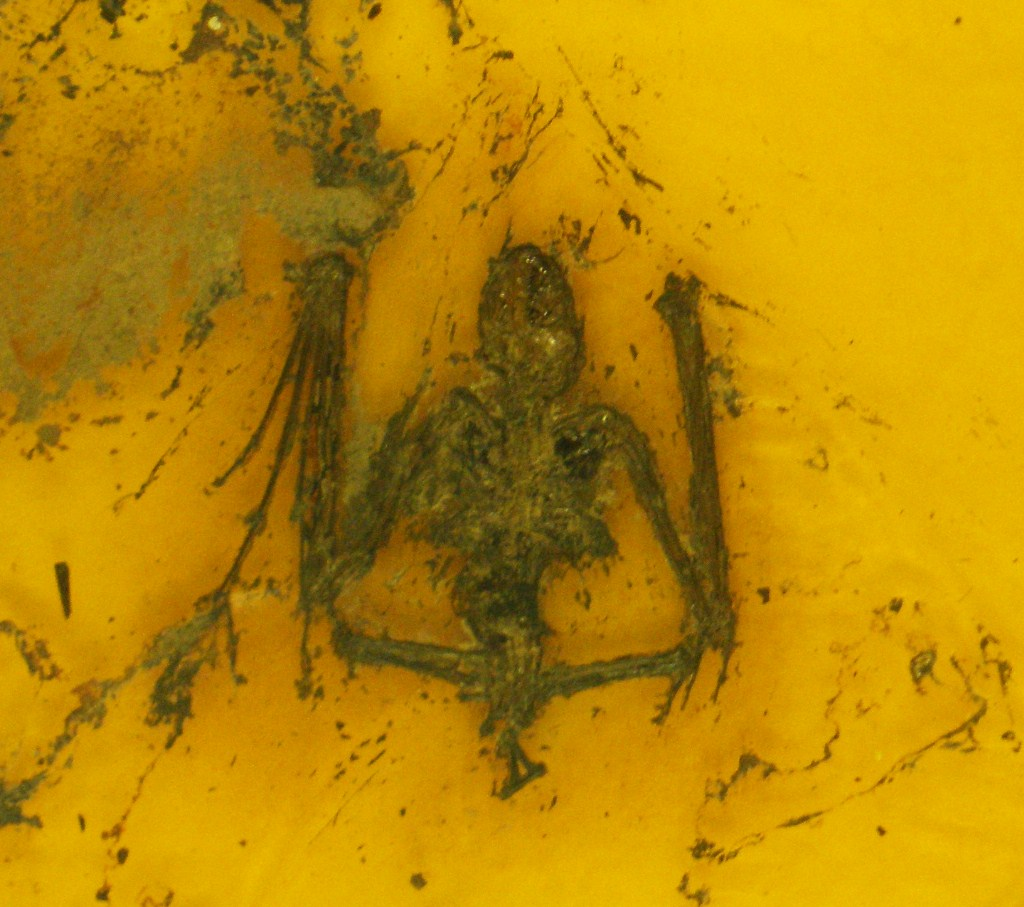 Fossil of Archaeonycteris, an extinct mammal- Took the photo at Senckenberg Museum of Frankfurt